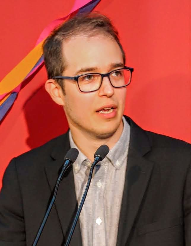 Alexandre Leduc prenant la parole lors du lancement de sa campagne électorale à la fin août 2018.